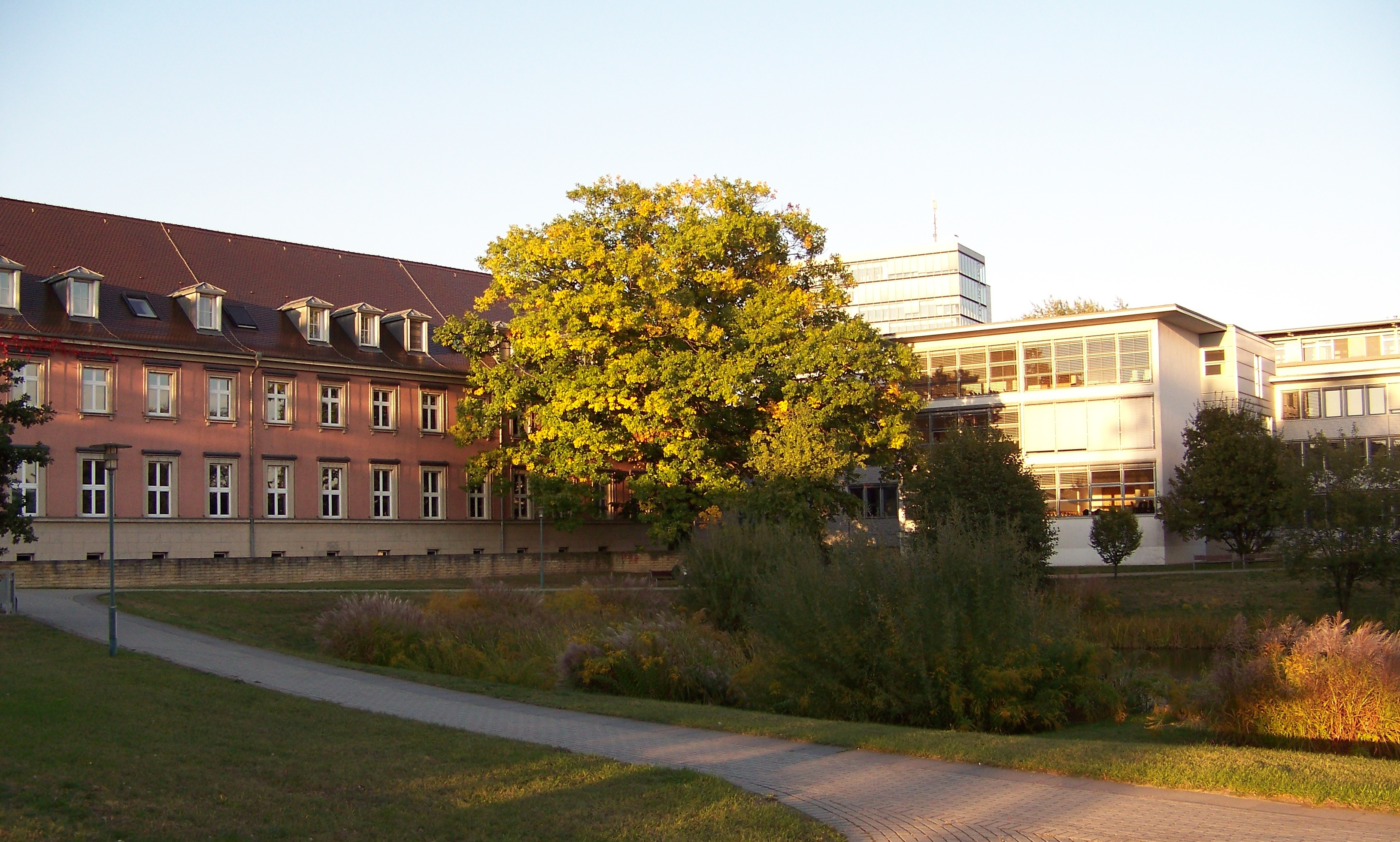 Alt- und Neubautrakt des Finanzgerichts. Die untergehende Sonne spiegelt sich in den Fenstern der Sitzungssäle.